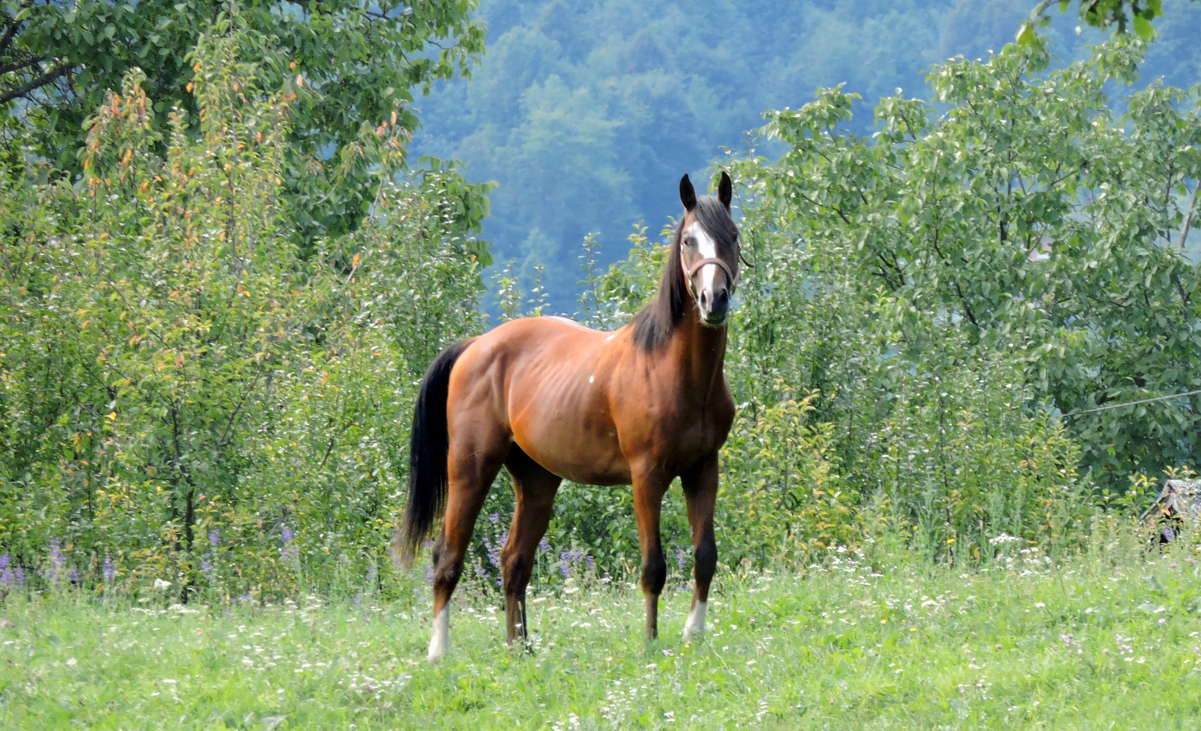 Beautiful horse